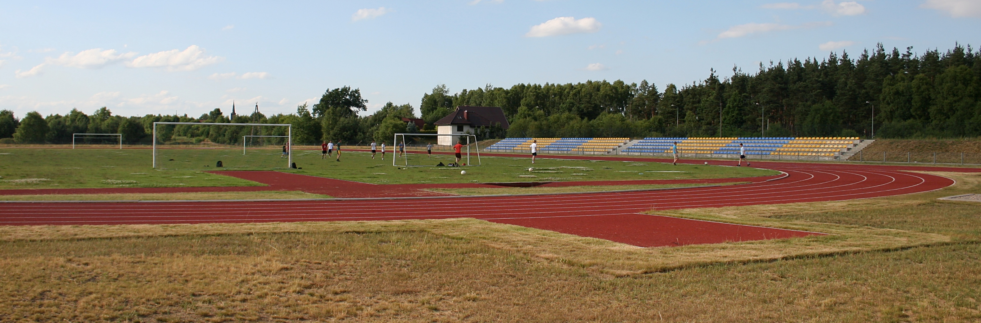 Kompleks sportowo-rekreacyjny „Pająk” w Konopiskach - stadion.